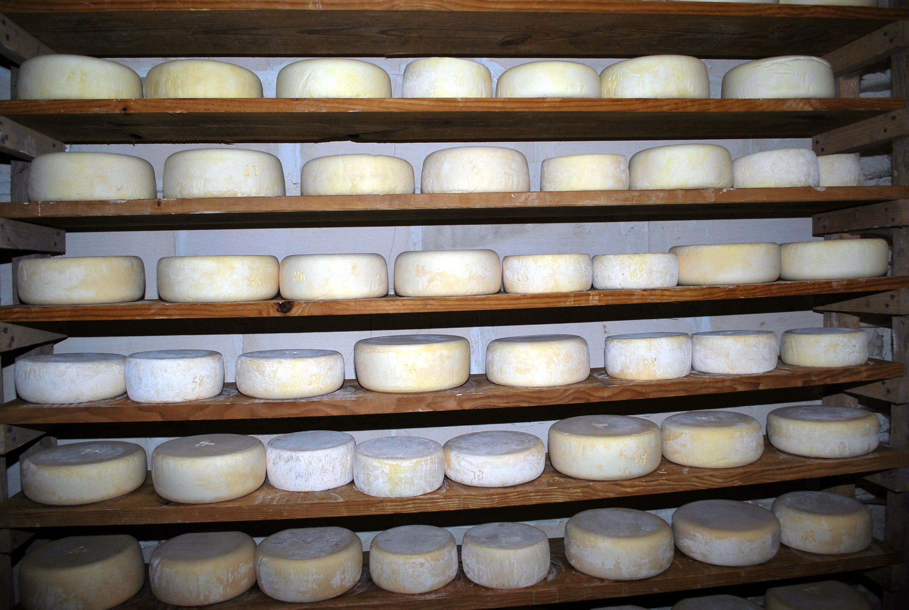 Fromages Ossau-Iraty (saloir de A&Y Perret) à Monein (Pyrénées-Atlantiques).